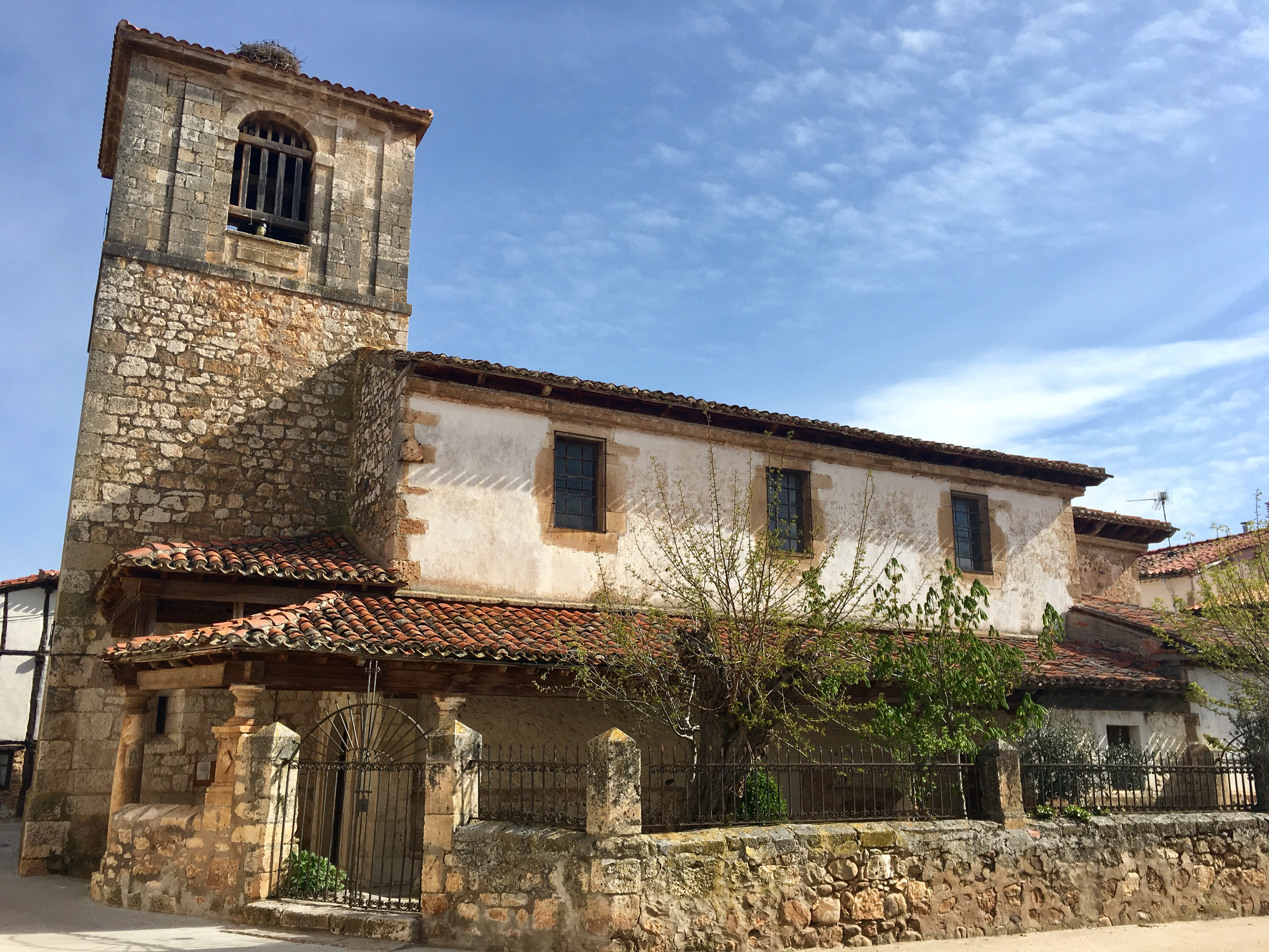 Puentedura